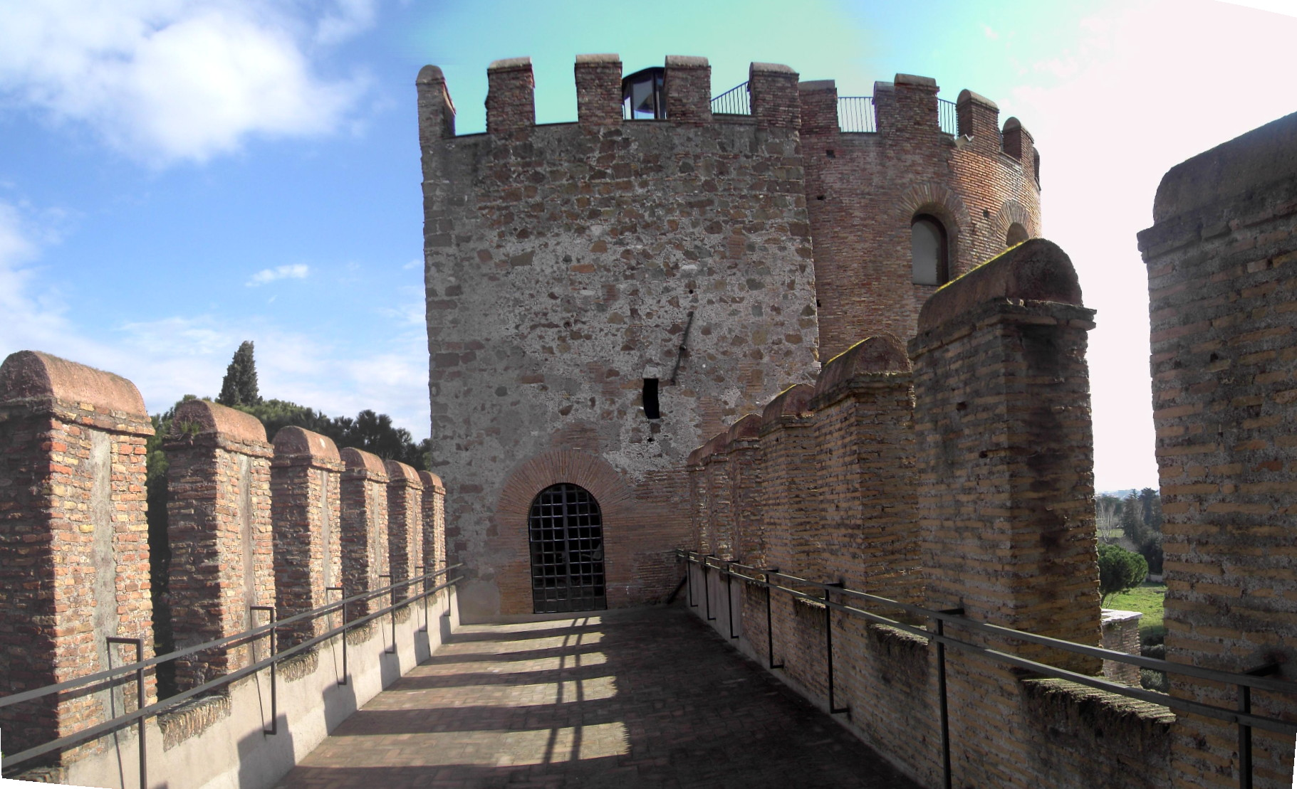 Roma , Porta san Sebastiano: camminamento fra le torri